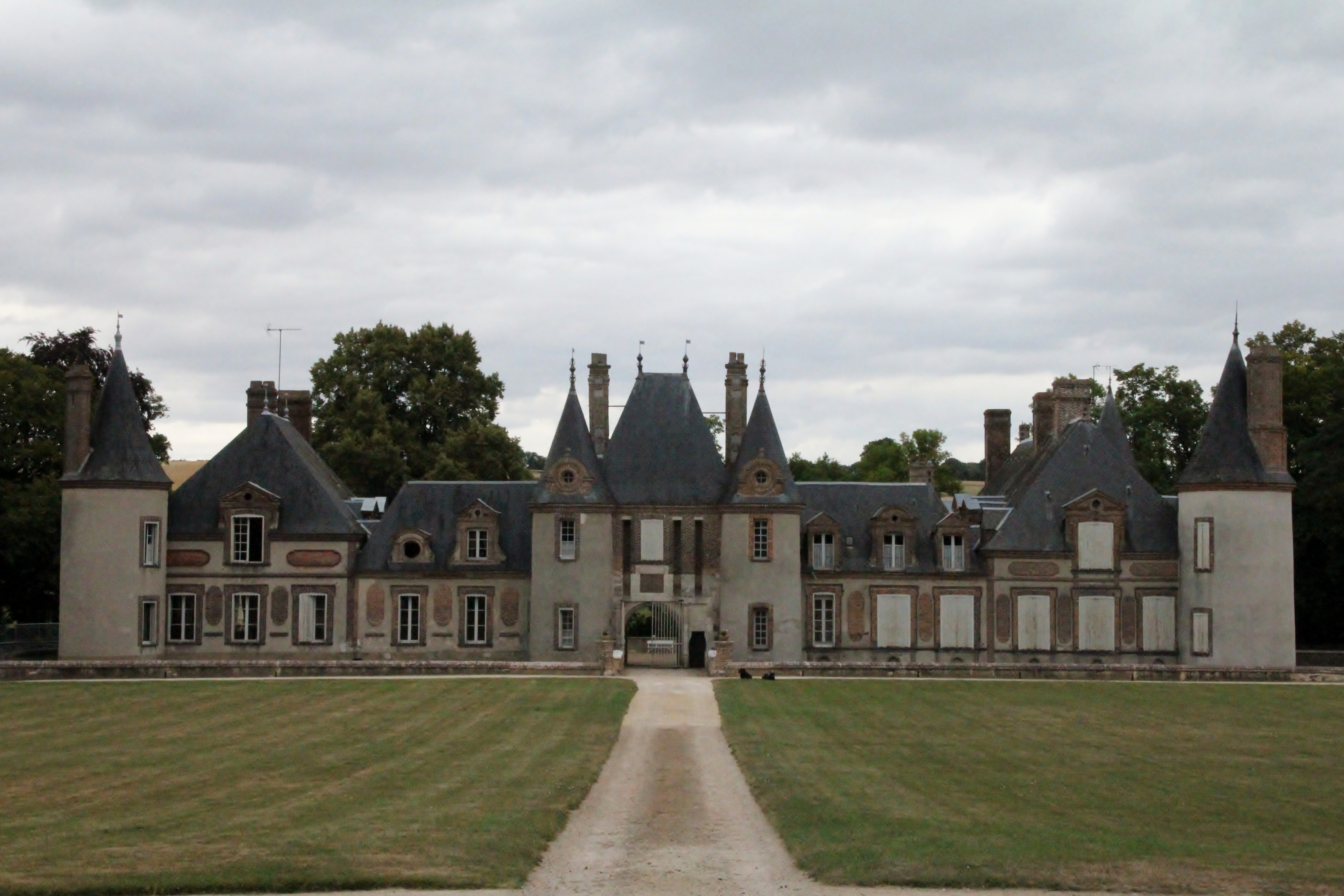 façade principale .